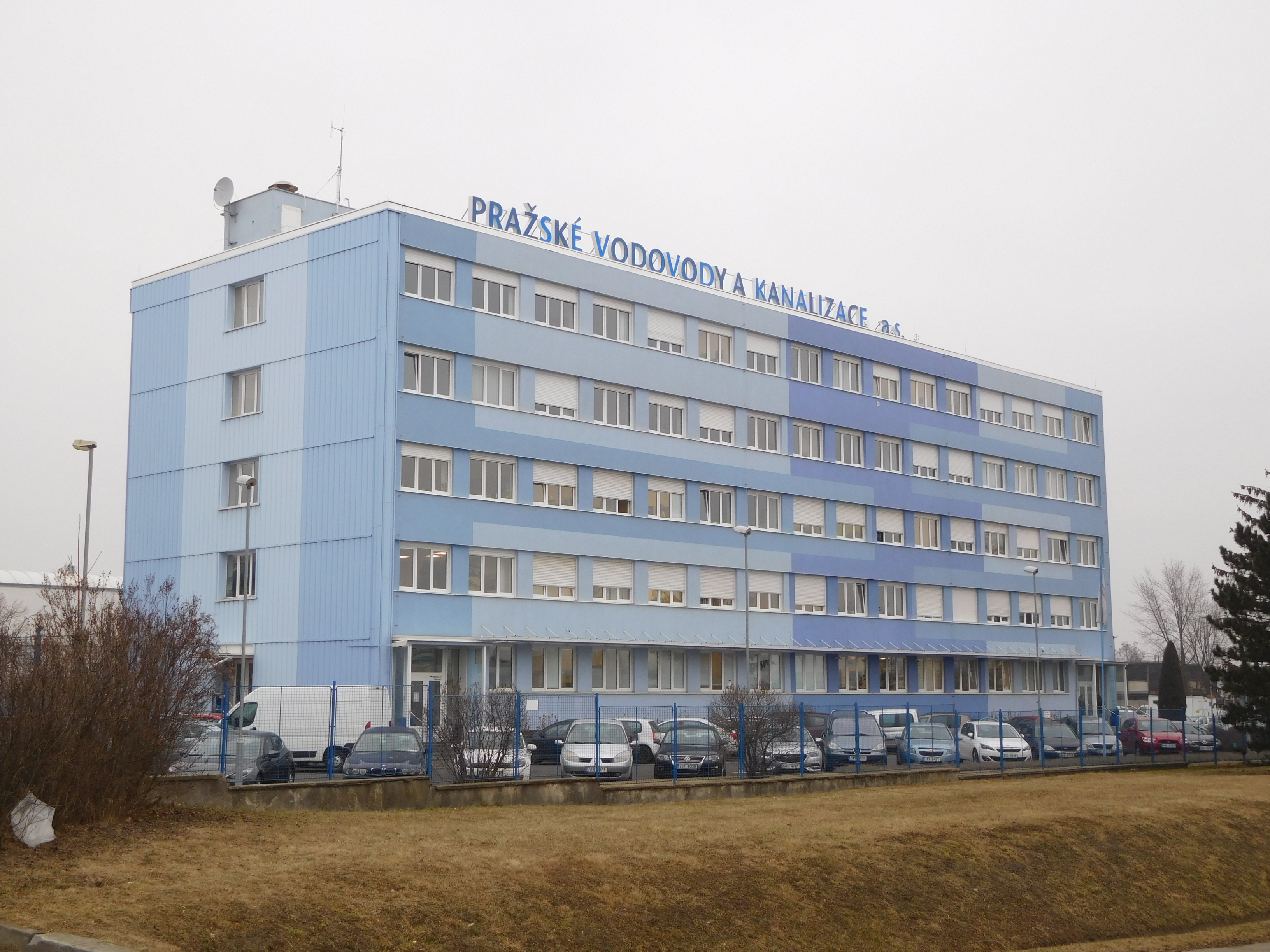 Praha - Hostivař, Ke Kablu 1 - Pražské vodovody a kanalizace